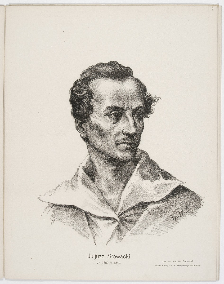 Juliusz Słowacki portrait from CBN Polona